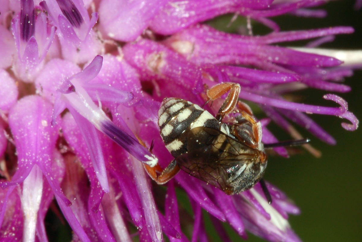 Epeolus variegatus, Eberstädter Düne, Darmstadt, Hessen, Deutschland